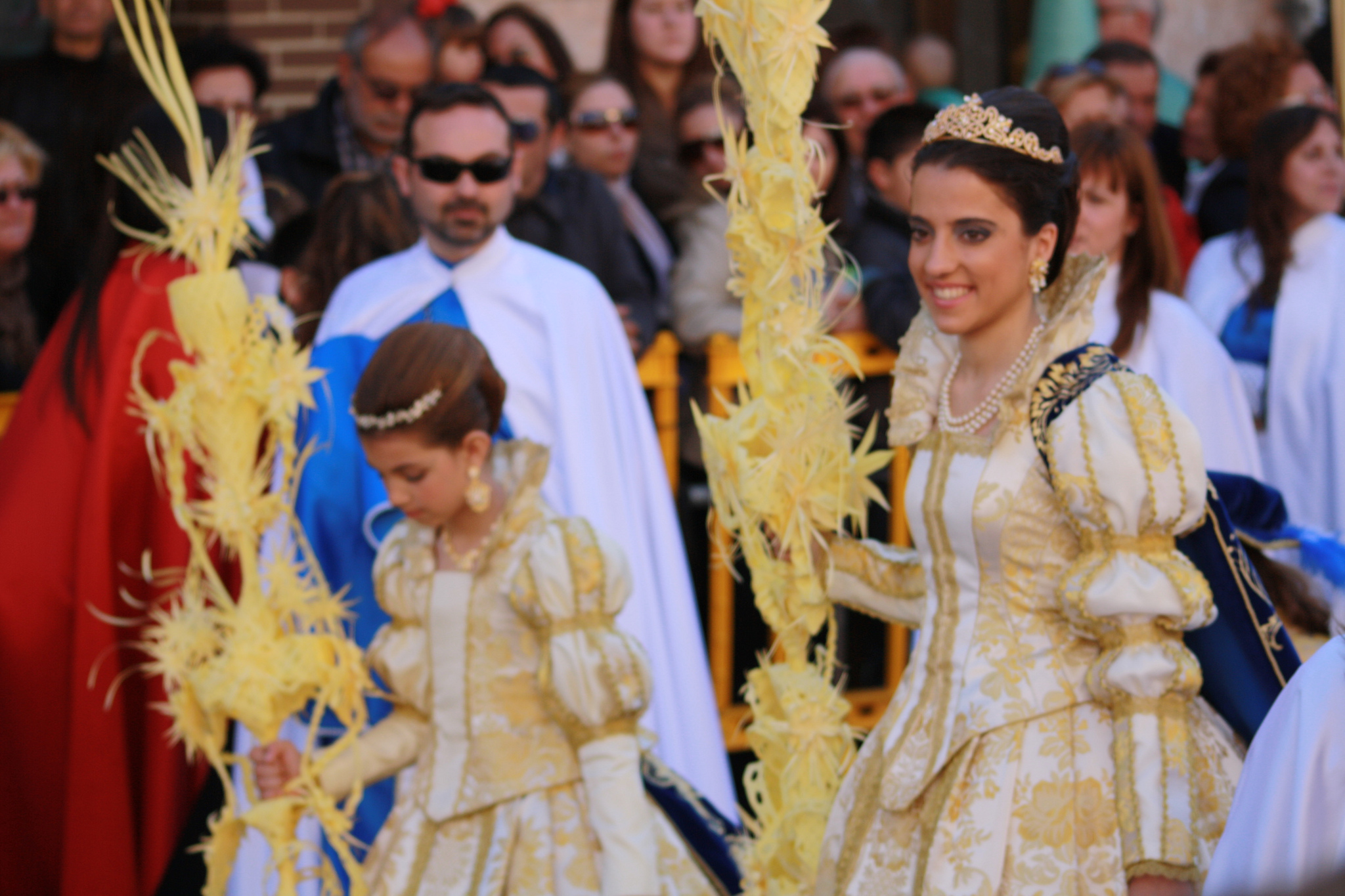 Semana Santa en Torrent This is a photography of a Folklore festival in Spain (Wikidata id Q21595880).